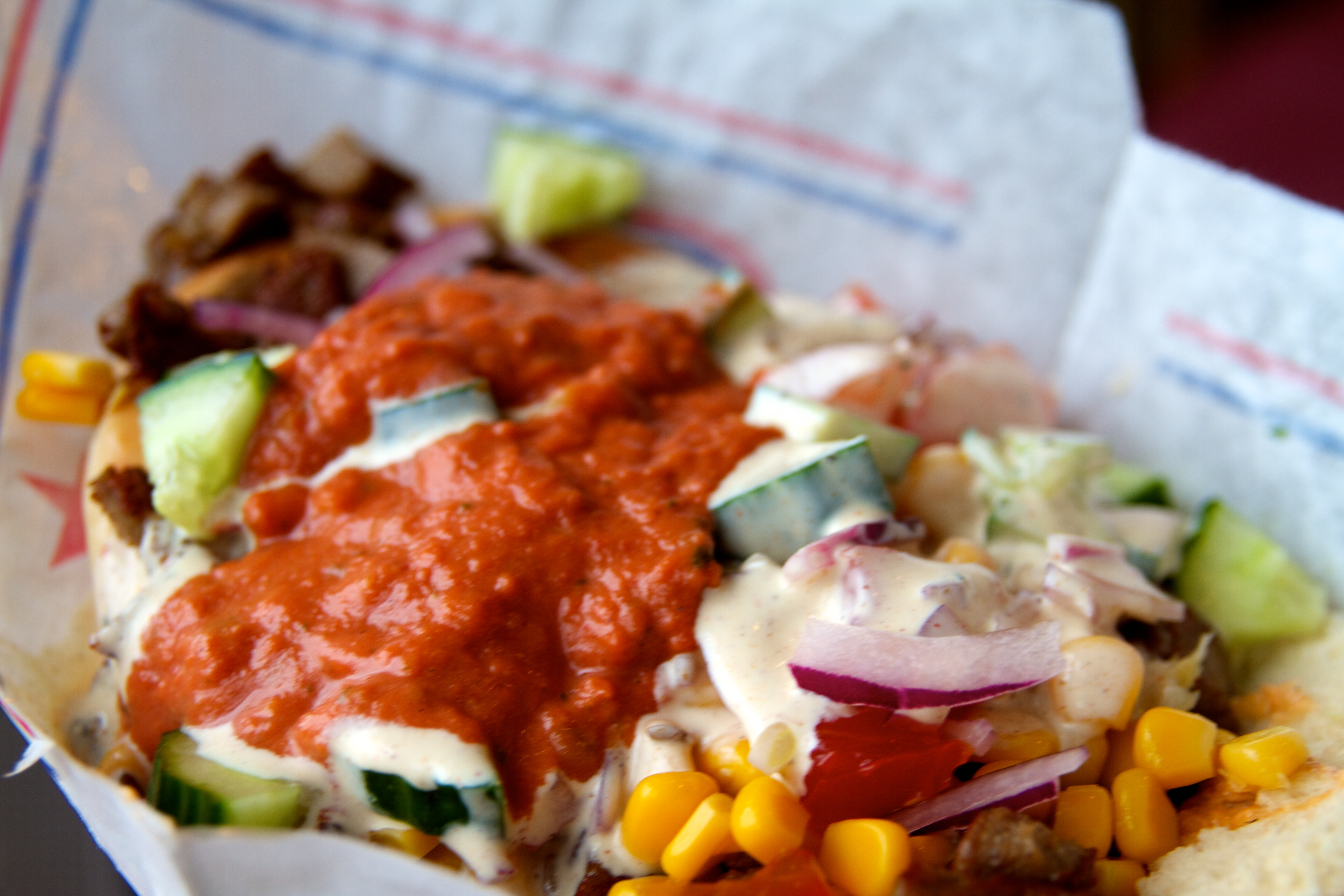 Typisk kebab slik den fåes i Norge.